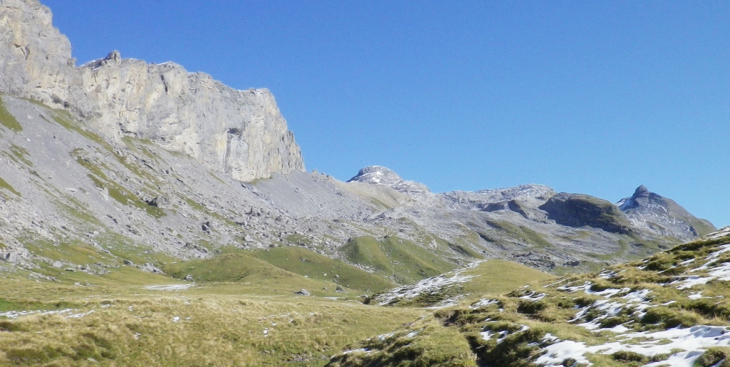 Rotsandnollen in der Bildmitte, links Barglen